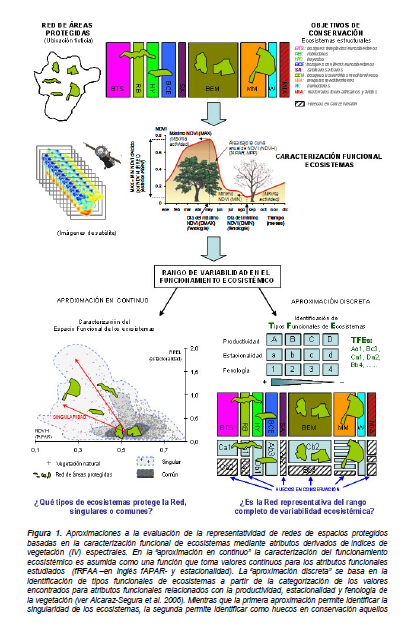 Metodología par la evaluación de la represantitividad de redes de espacios naturales protegidos